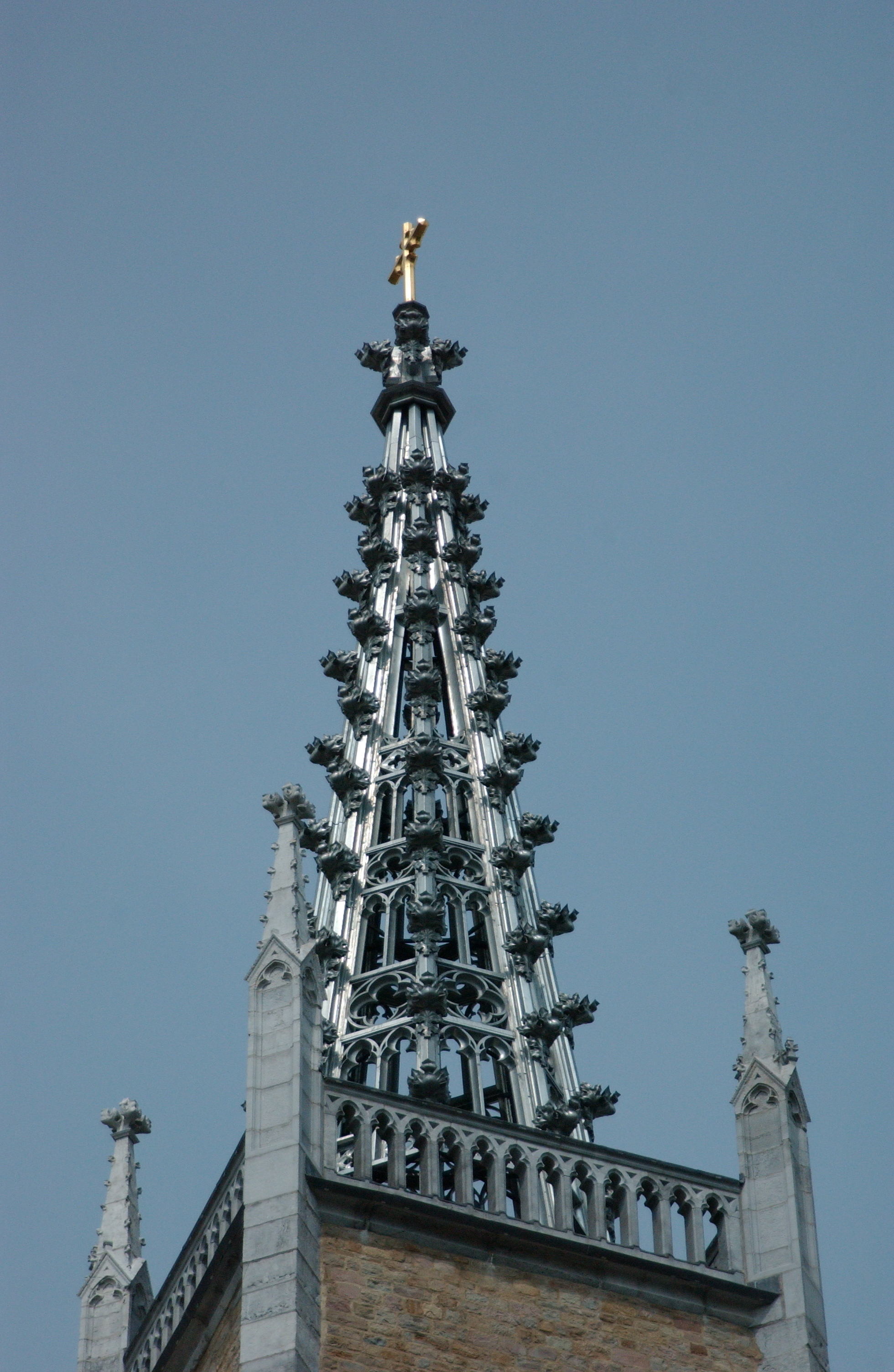 Église de la Paix, avec une chaire, 22 dalles funéraires dans le vieux cimetière et un mur d'enceinte